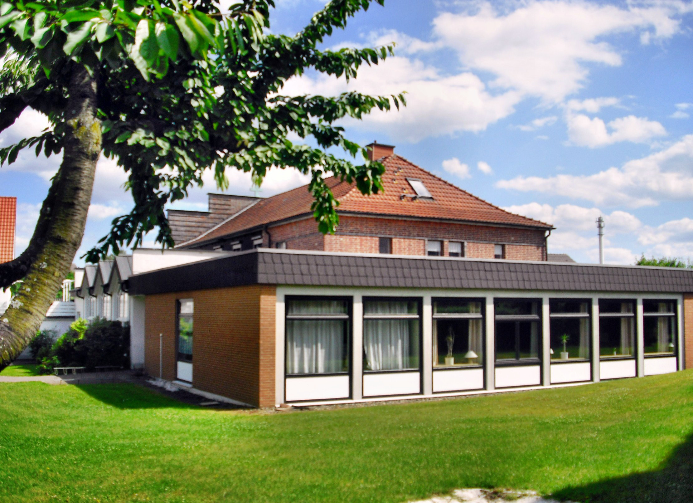 Friedenskirche Uslar, Gottes haus der Evangelisch-Freikirchlichen Gemeinde (Baptisten) Uslar (Deutschland) - von hinten gesehen (mit Anbauten von 1975 und 1994/95